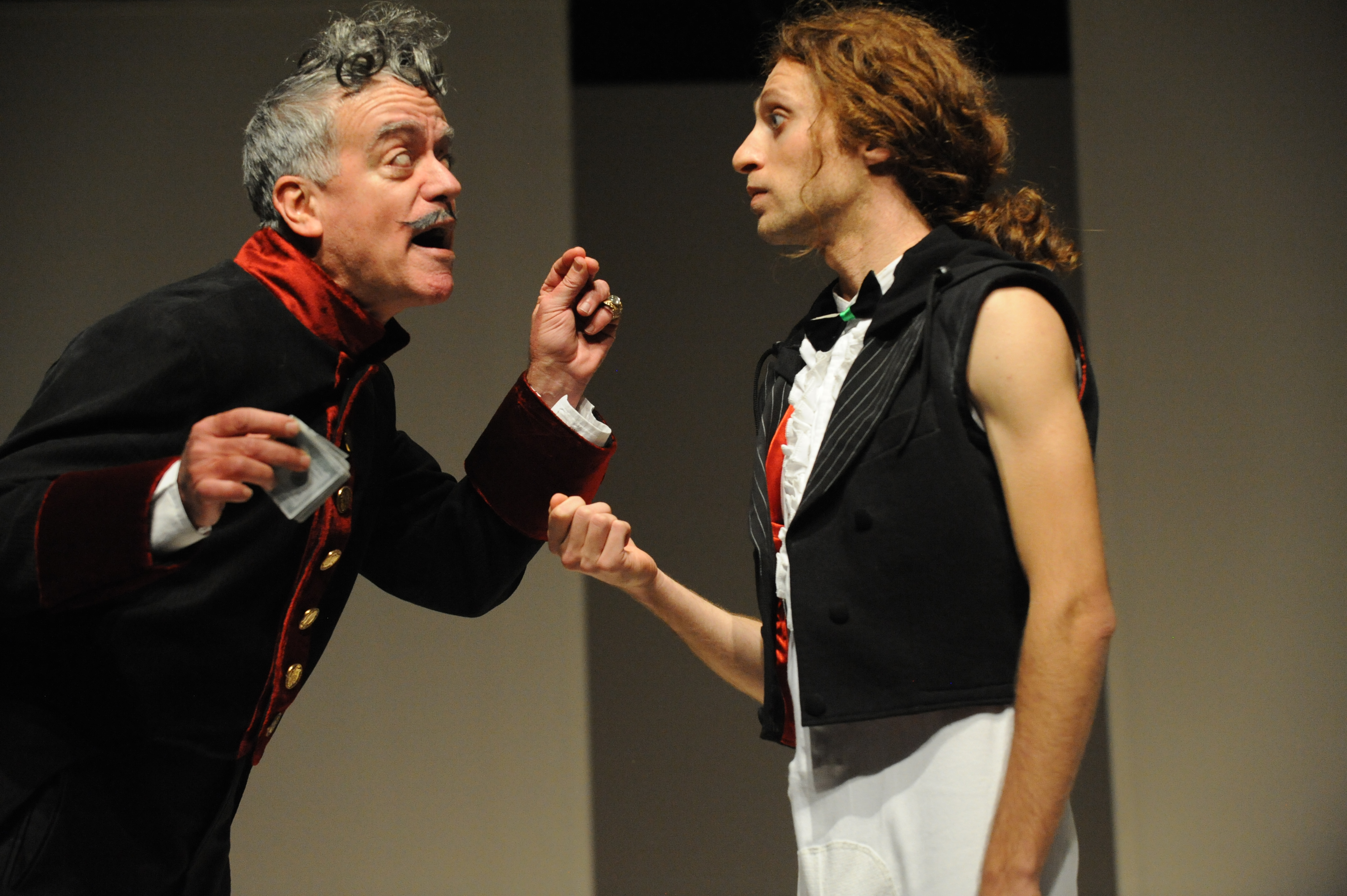 ויטלי פרידלנד ויהויכין פרידלנדר, בהצגה "תעלולי סקפן", בבימויו של אודי בן-משה, תיאטרון החאן, 2010